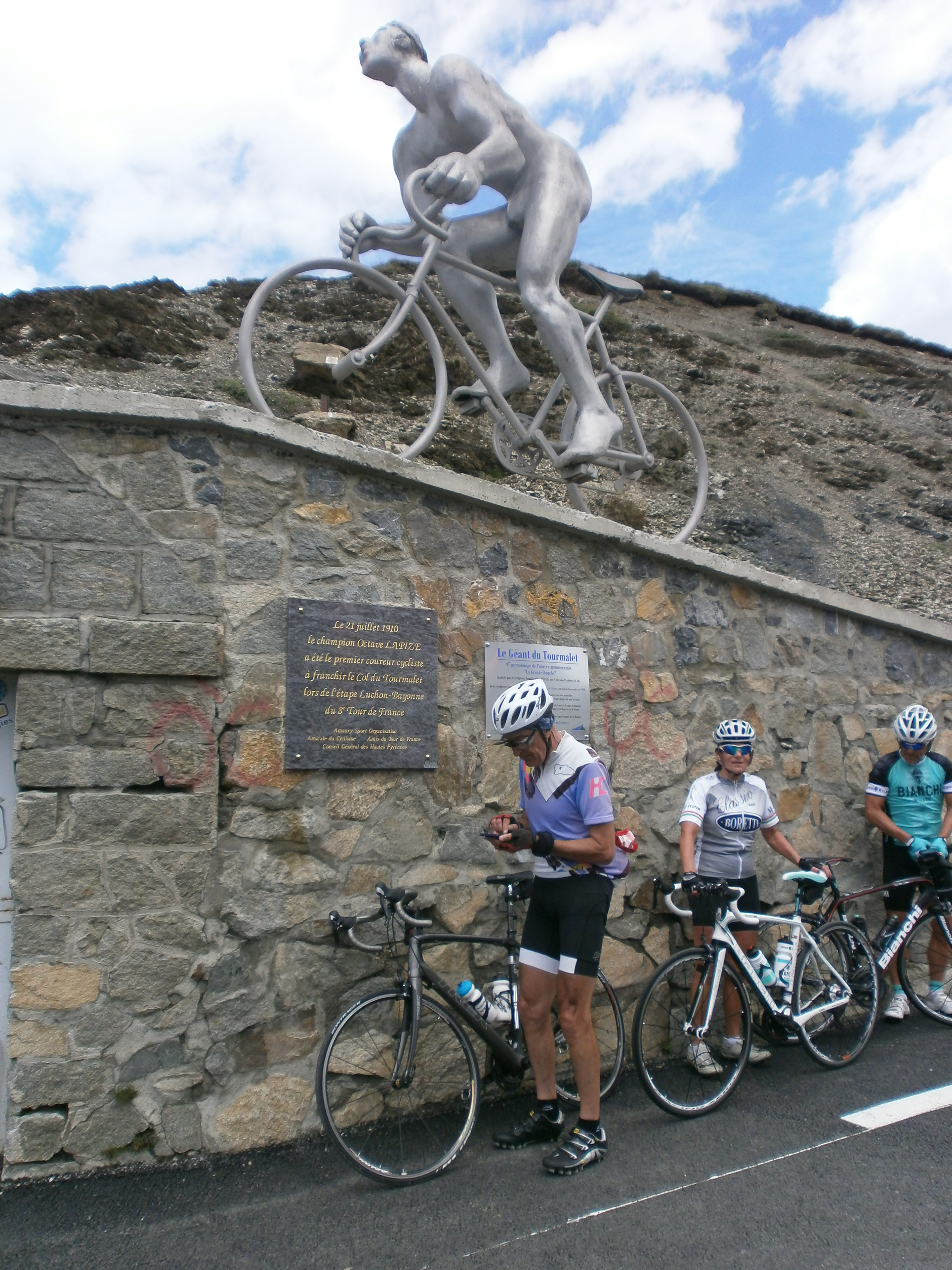 Cicloturismo-Col del Tourmalet-Francia